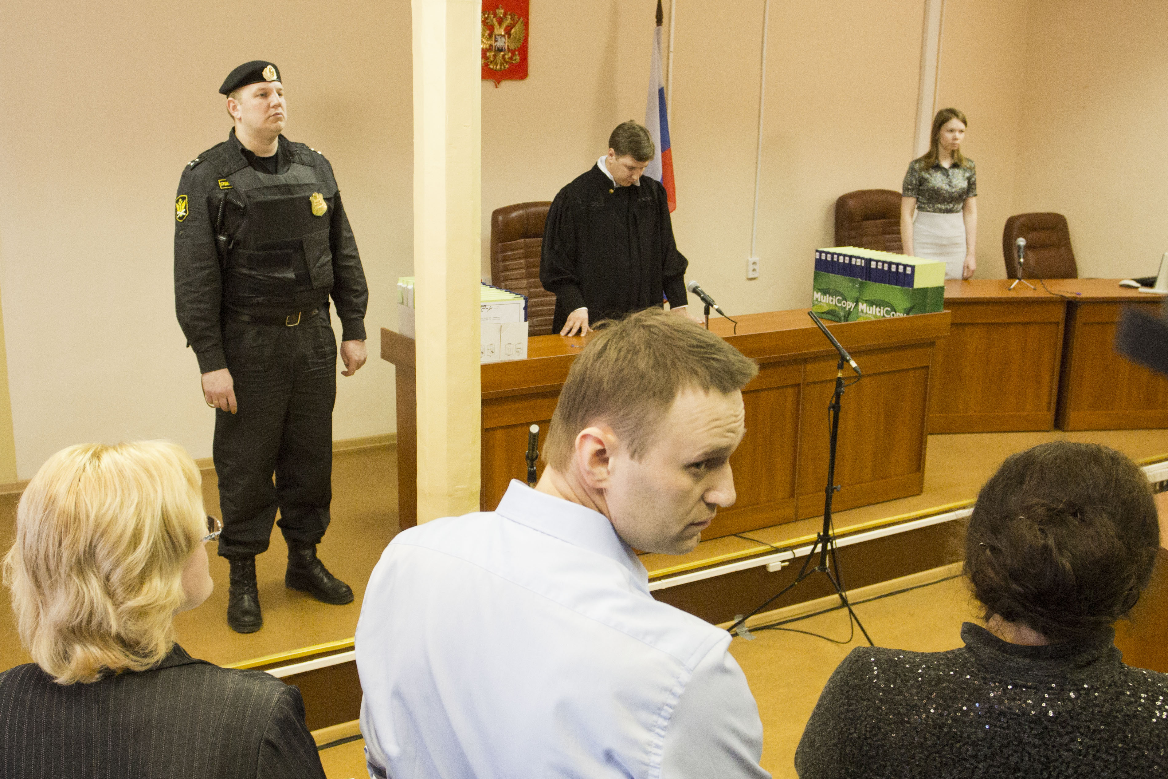 Алексей Навальный в зале Ленинского суда Кирова